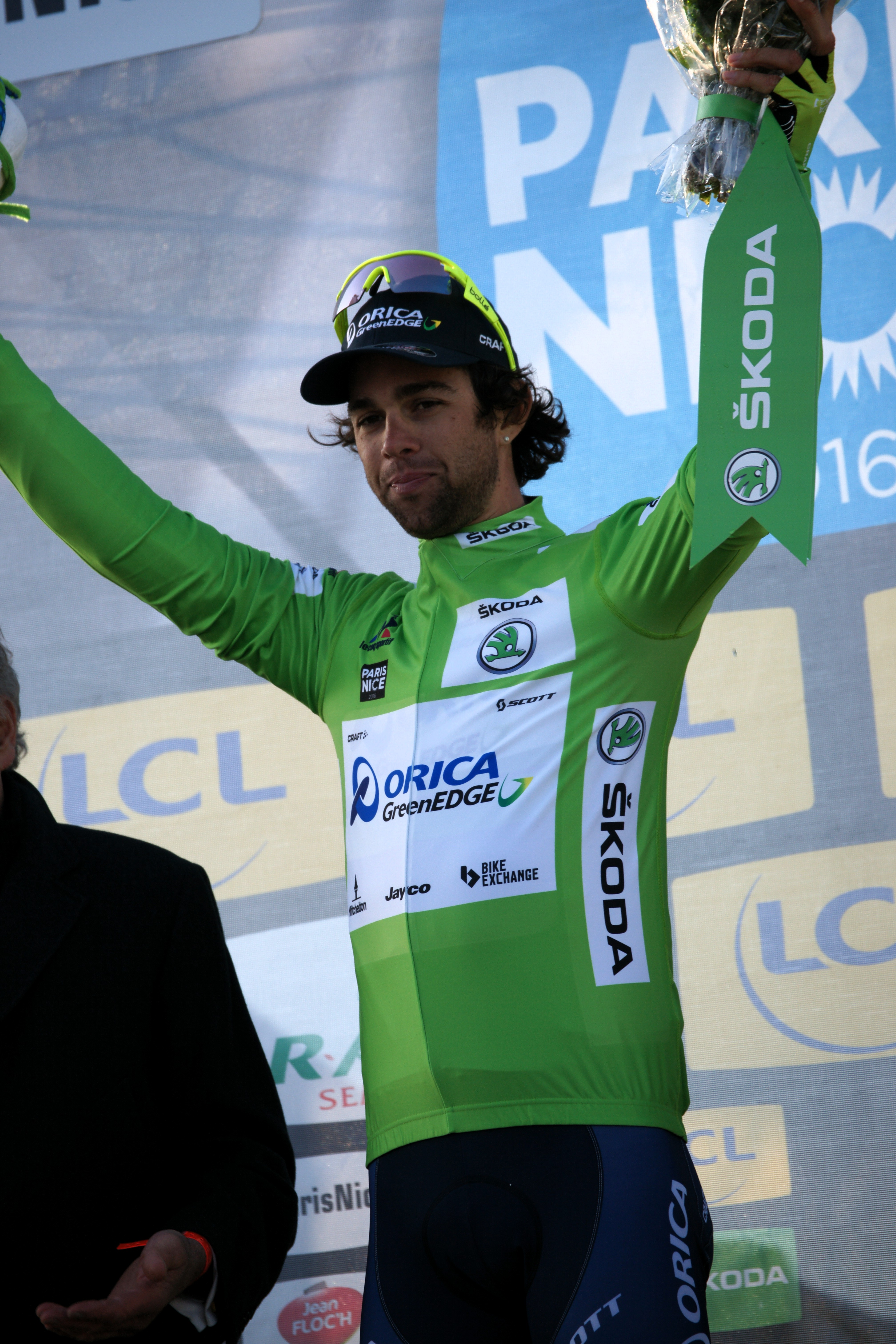 Michael Matthews vert Madone d'Utelle 2016 Depicted person: Michael Matthews (cyclist) Depicted team: Orica-GreenEDGE